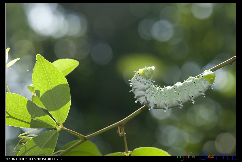 Samia wangi 王氏眉紋天蠶蛾